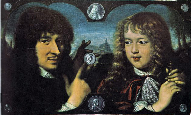 Anonimo, jean warin mostra un'antica medaglia a luigi XIV fanciullo, musee de la monnaye, parigi.jpg